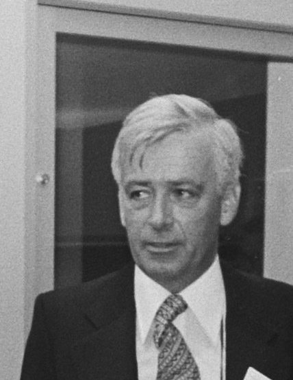 Collectie / Archief : Fotocollectie Anefo Reportage / Serie : [ onbekend ] Beschrijving : Prinses Beatrix opent nieuw gebouw Allard Pierson Museum te Amsterdam Datum : 6 oktober 1976 Locatie : Amsterdam, Noord-Holland Trefwoorden : gebouwen, openingen, prinsessen Persoonsnaam : Beatrix, prinses Fotograaf : Verhoeff, Bert / Anefo Auteursrechthebbende : Nationaal Archief Materiaalsoort : Negatief (zwart/wit) Nummer archiefinventaris : bekijk toegang 2.24.01.05 Bestanddeelnummer : 928-8166